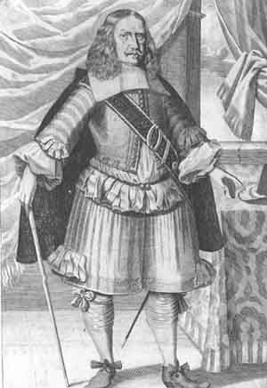 Georg II. von Hessen-Darmstadt, 1605-1661